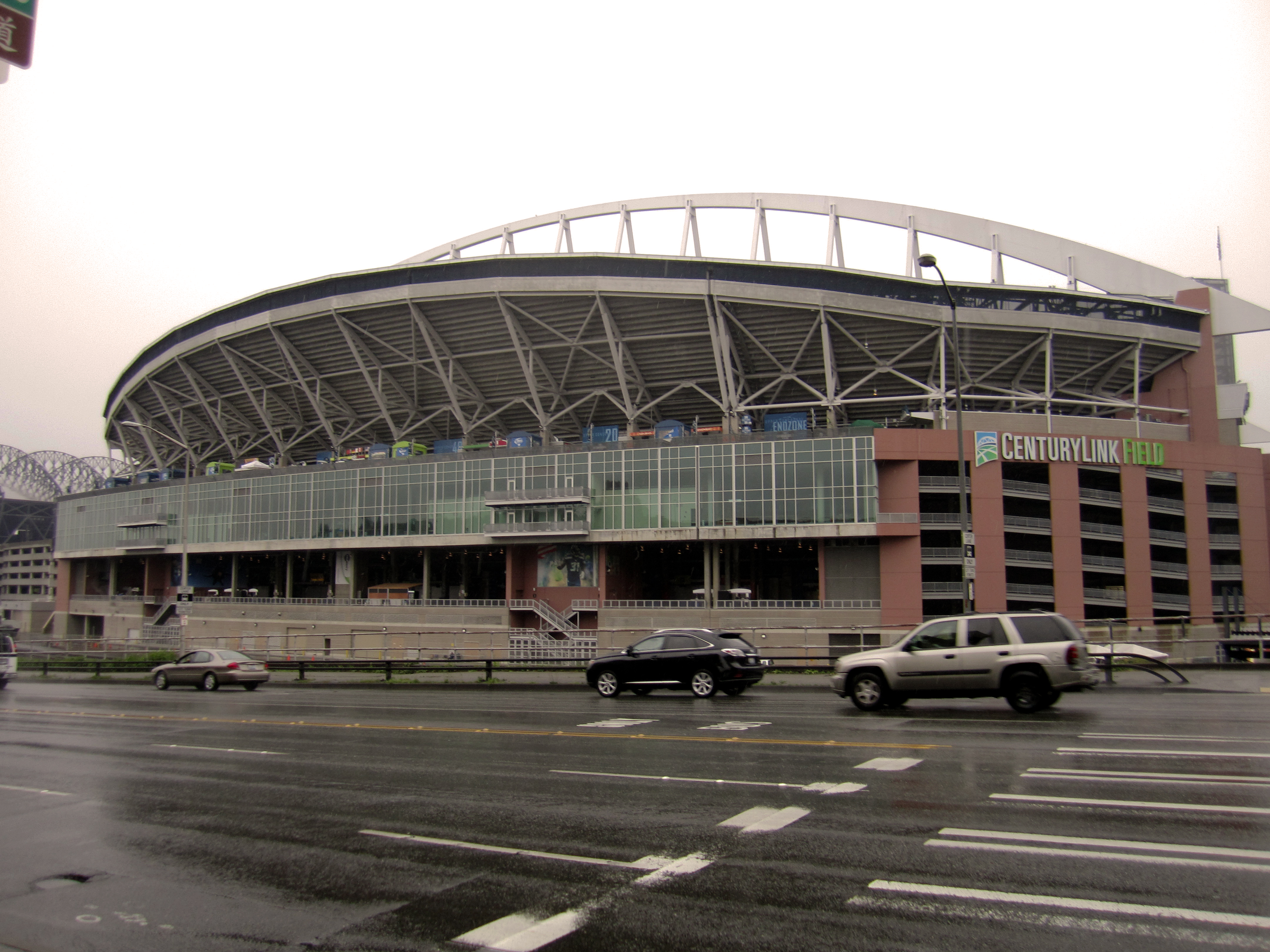 L'esterno dello stadio CenturyLink Field di Seattle